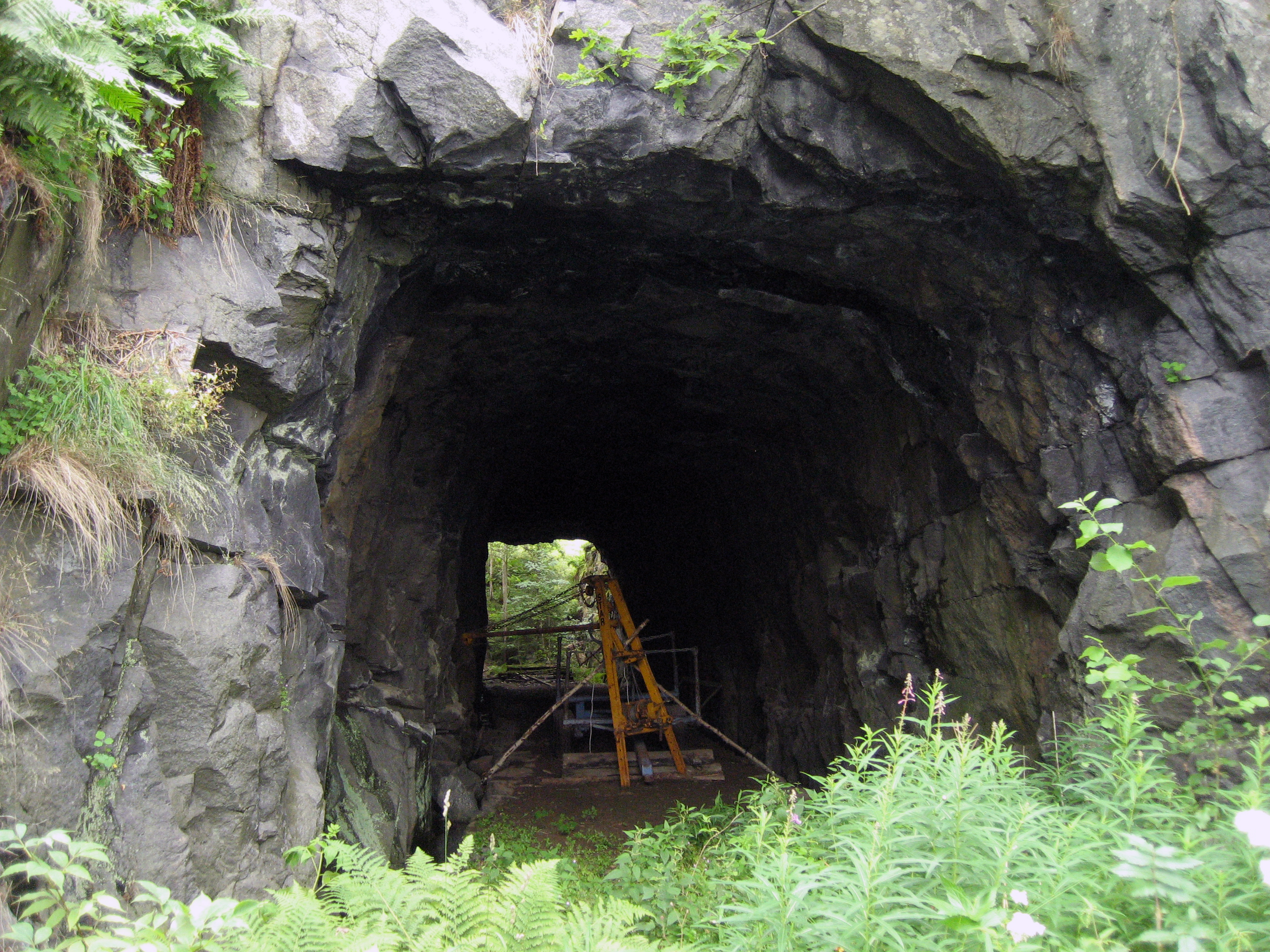 Höversbytunneln i juli 2011